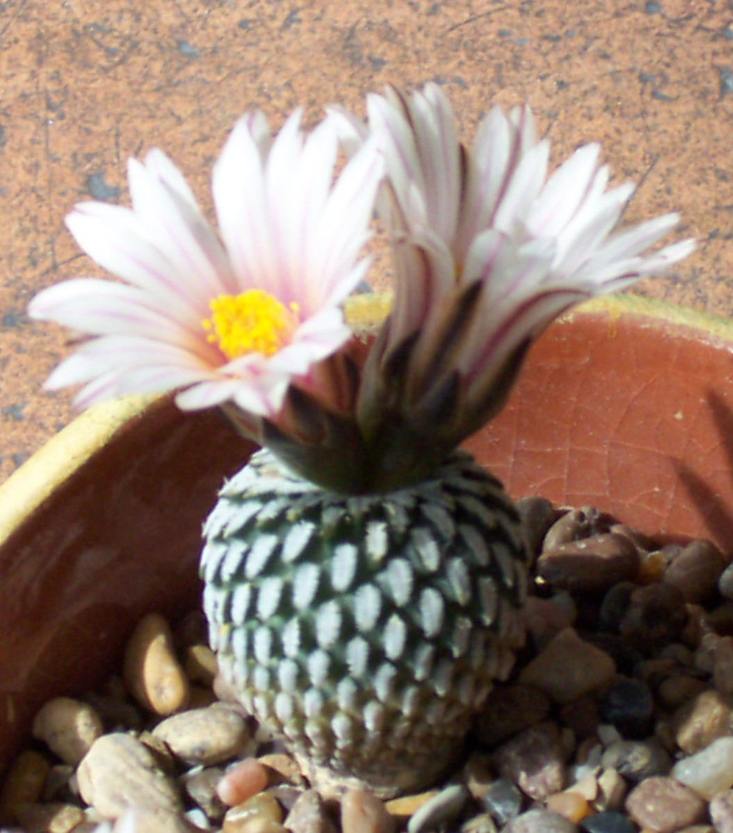 kaktalia